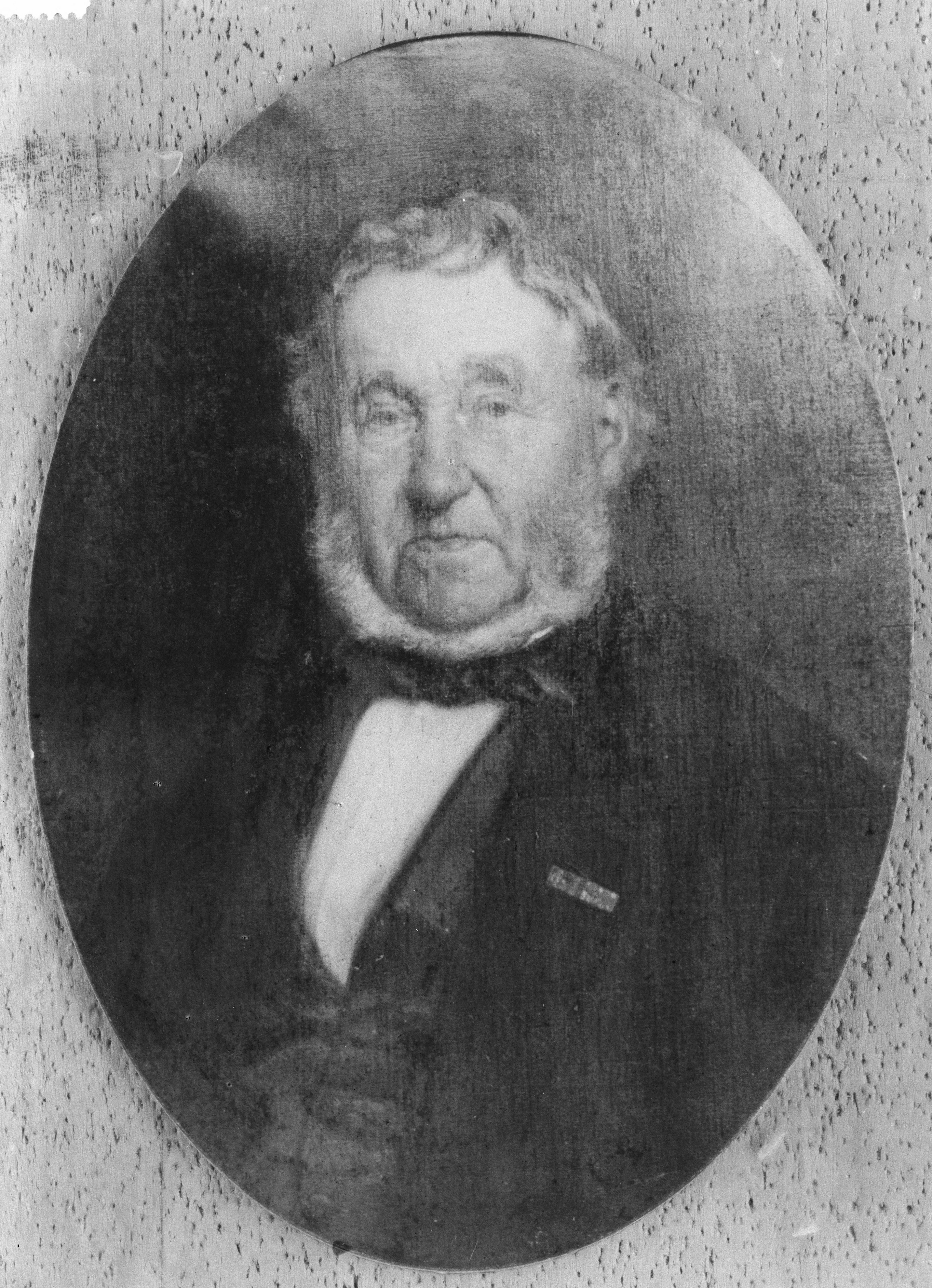 mr. Joannes Benedictus Hyacinthus van de Mortel (1797-1887)